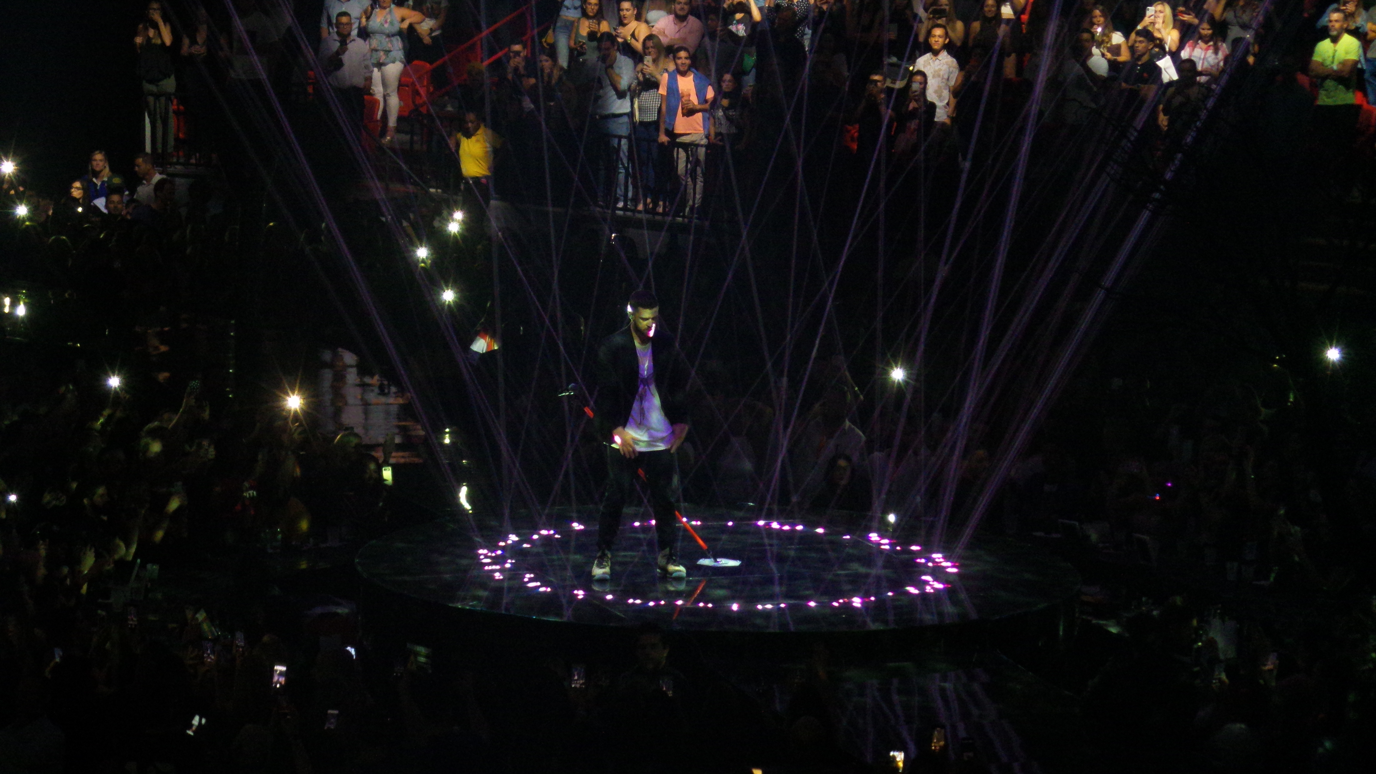 Justin Timberlake en un concierto de su gira Man of the Woods Tour en la ciudad de Miami el 18 de mayo de 2018.